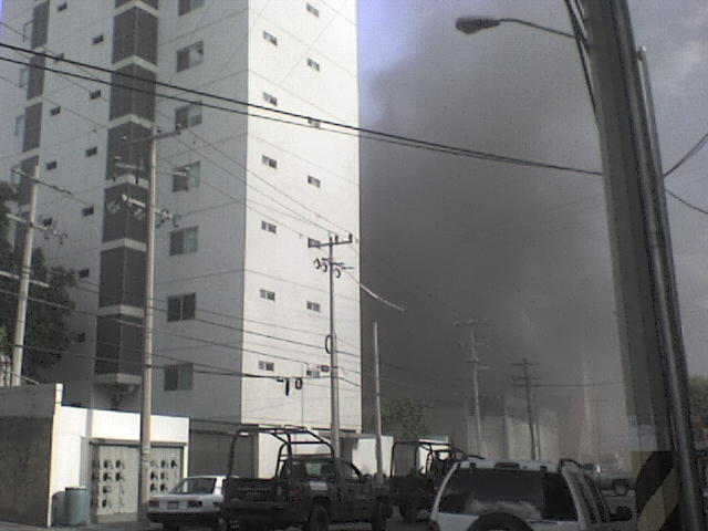 Humo saliendo desde el interior del Casino Royale Monterrey. Vista desde la calle Dr. Jesús María GonzálezUnknown smoke coming from inside the casino royale monterrey. view from dr. jesus maria gonzalez street